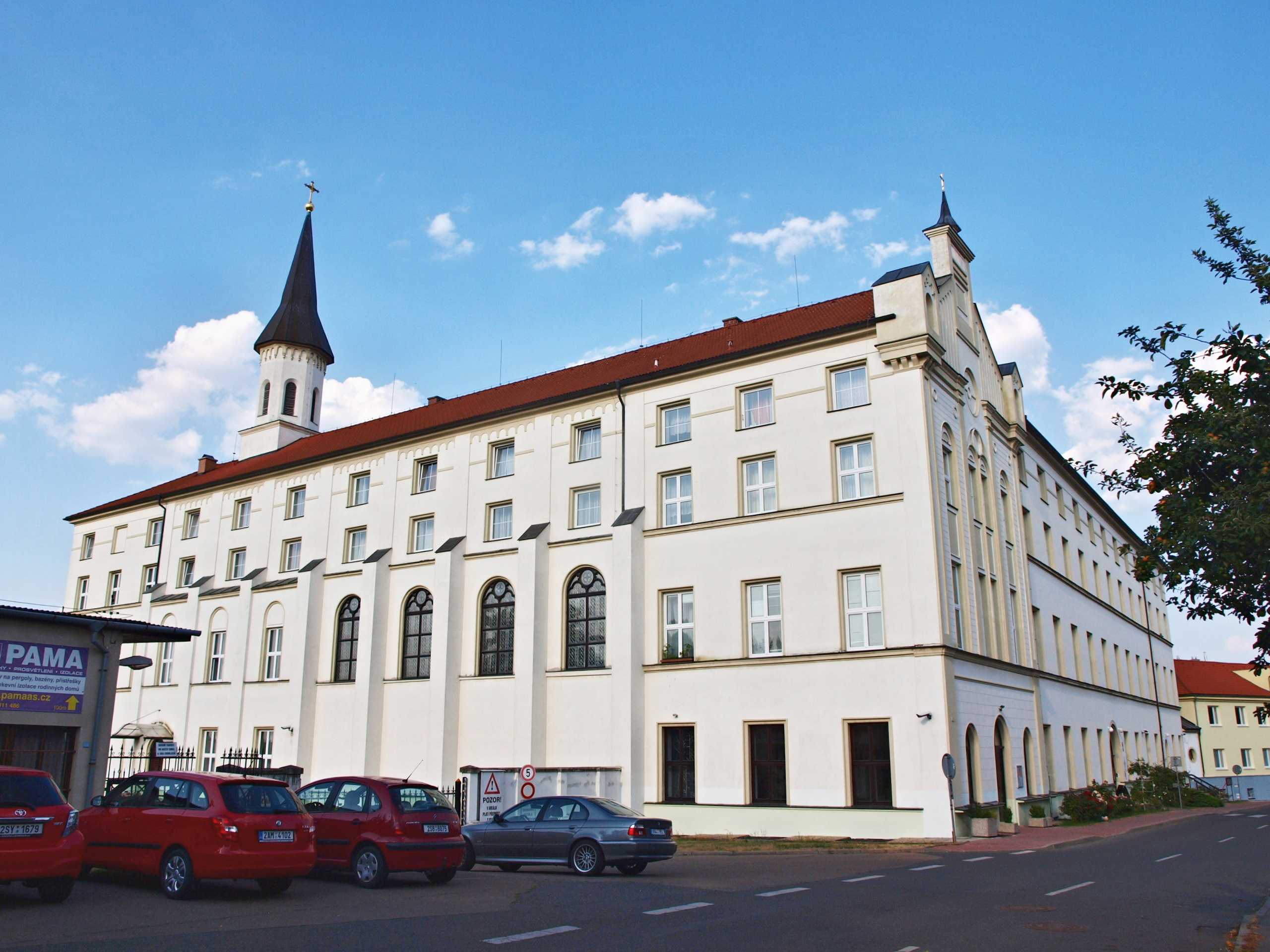 Klášter sester boromejek v Praze-Řepích